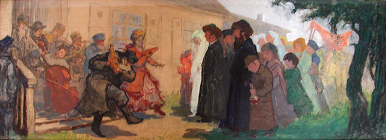 Dar chleba